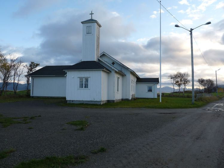 Sand kirke, Hadsel kommune. Foto: Bertha Aarø. Fra Riksantikvarens Kulturminnesøk.